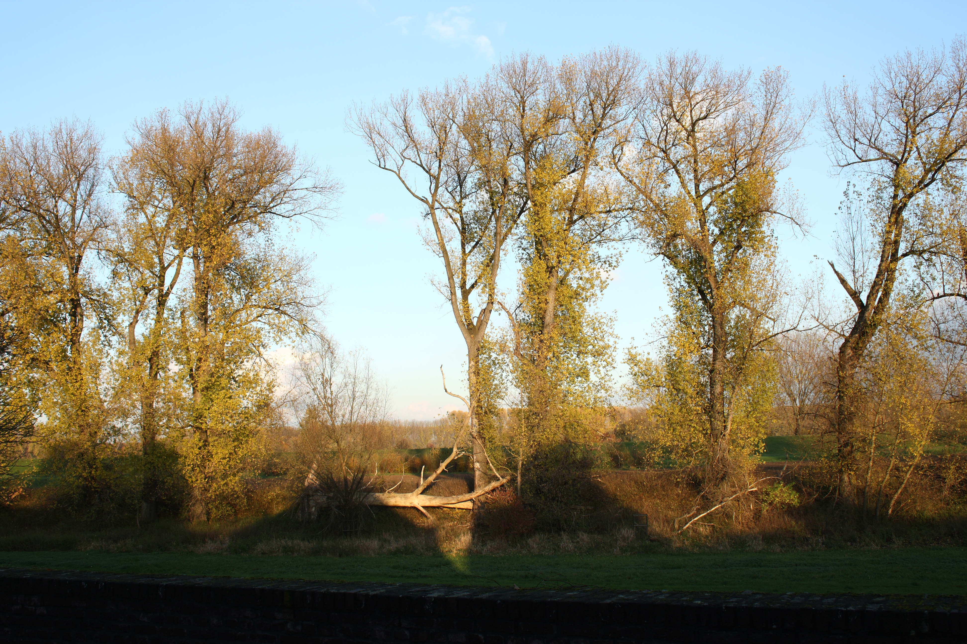 Dormagener Rheinaue bei Zons, einem Stadtteil von Dormagen im Rhein-Kreis Neuss (Nordrhein-Westfalen)